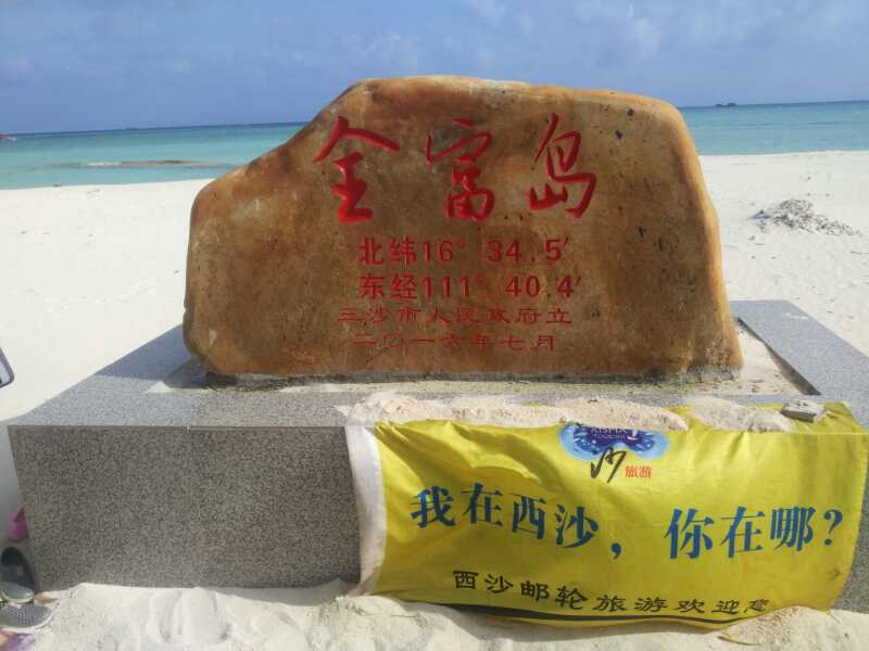 全富岛主权碑